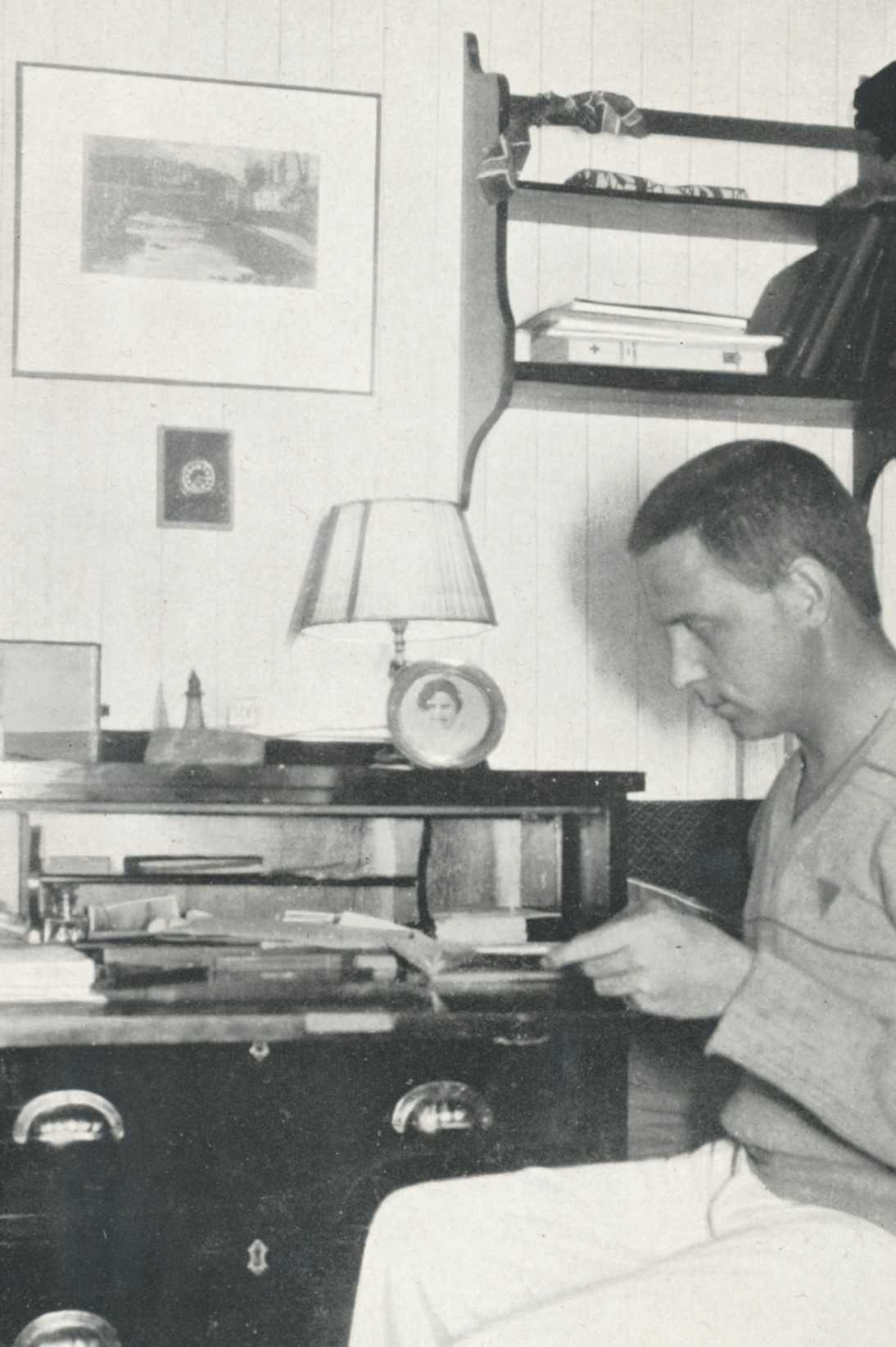 Leif Lier i kahytten på hvalskuta Kosmos